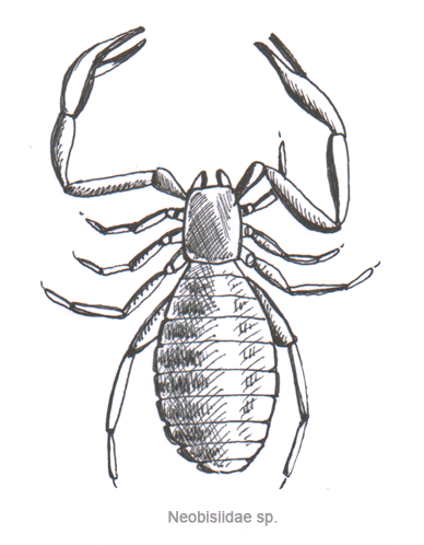 Pseudoscorpiones - Neobisiidae